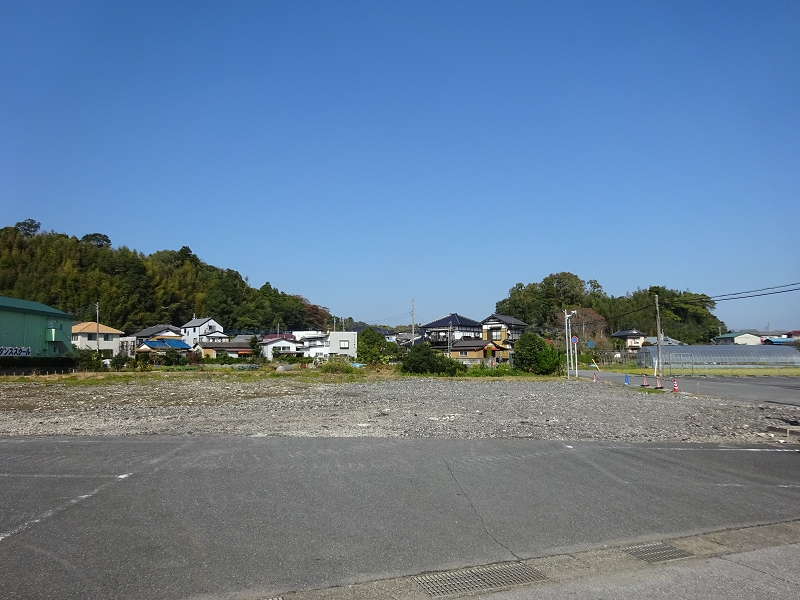 多古城遠景